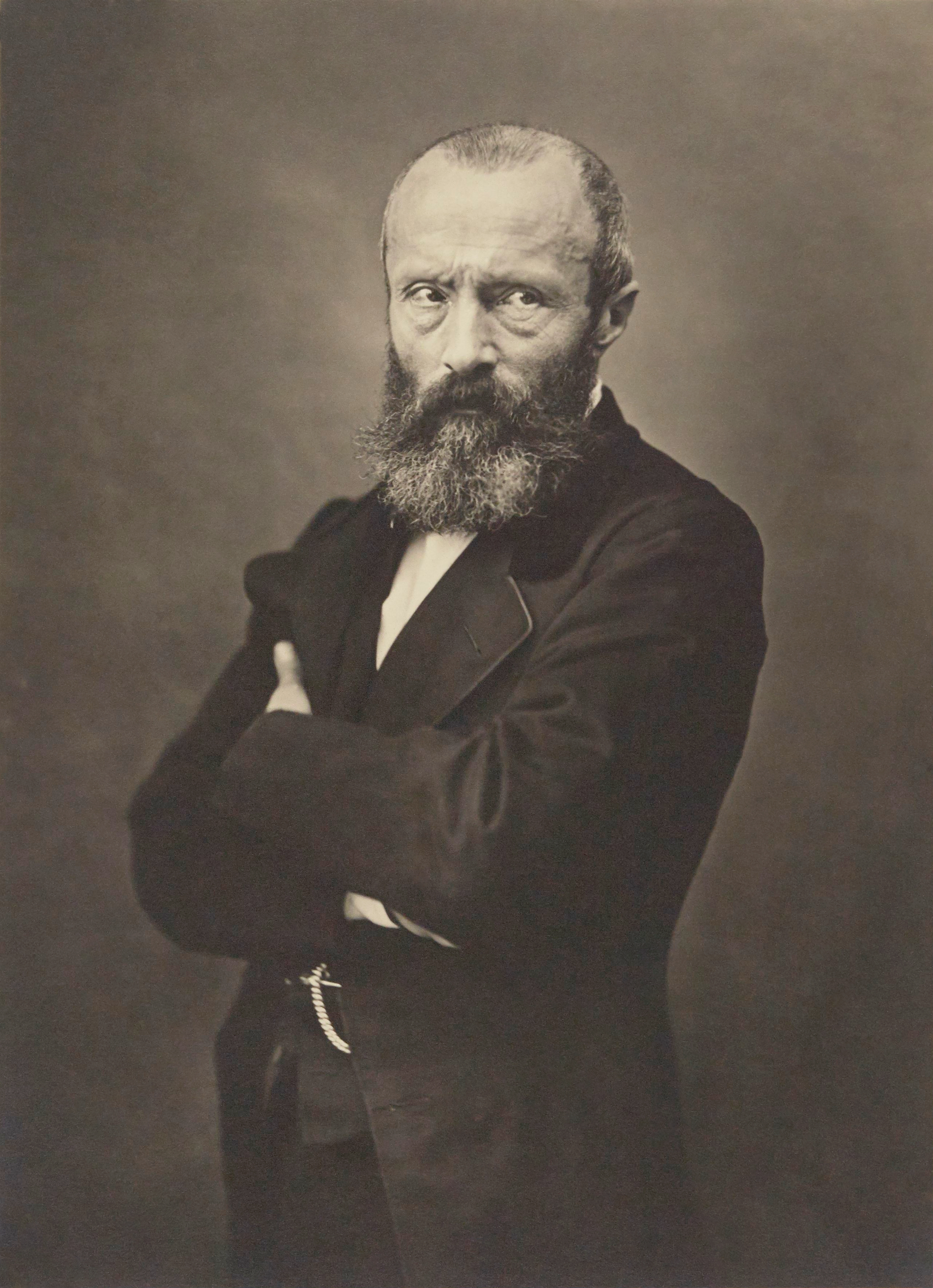 Théophile Thoré-Bürger, French journalist and art critic. Photograph by Nadar, print done by his son, Paul Nadar (1856-1939) 1 photogr. pos. : d'après négatif sur plaque de verre ; 22,4 x 16,2 cm (im.), 24,9 x 17,5 cm (épr.)